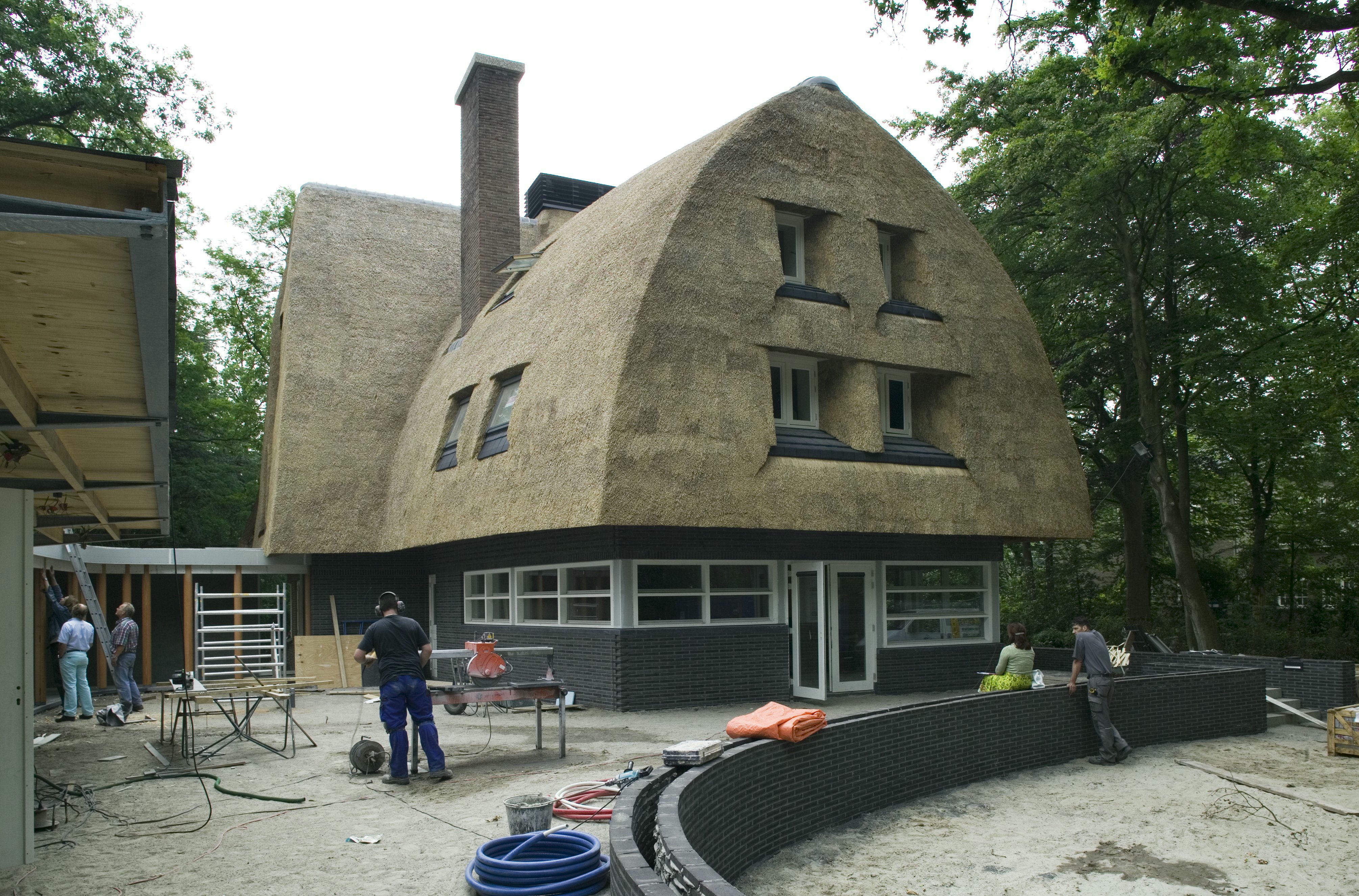 De Zandhoeve: Overzicht van de uitbouw aan de achtergevel met rieten kap, tijdens werkzaamheden